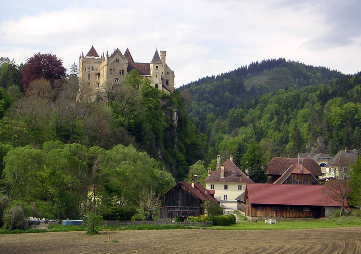 Eberstein im Bezirk Sankt Veit in Kärnten. Mai 2005, selbst fotografiert, public domain.